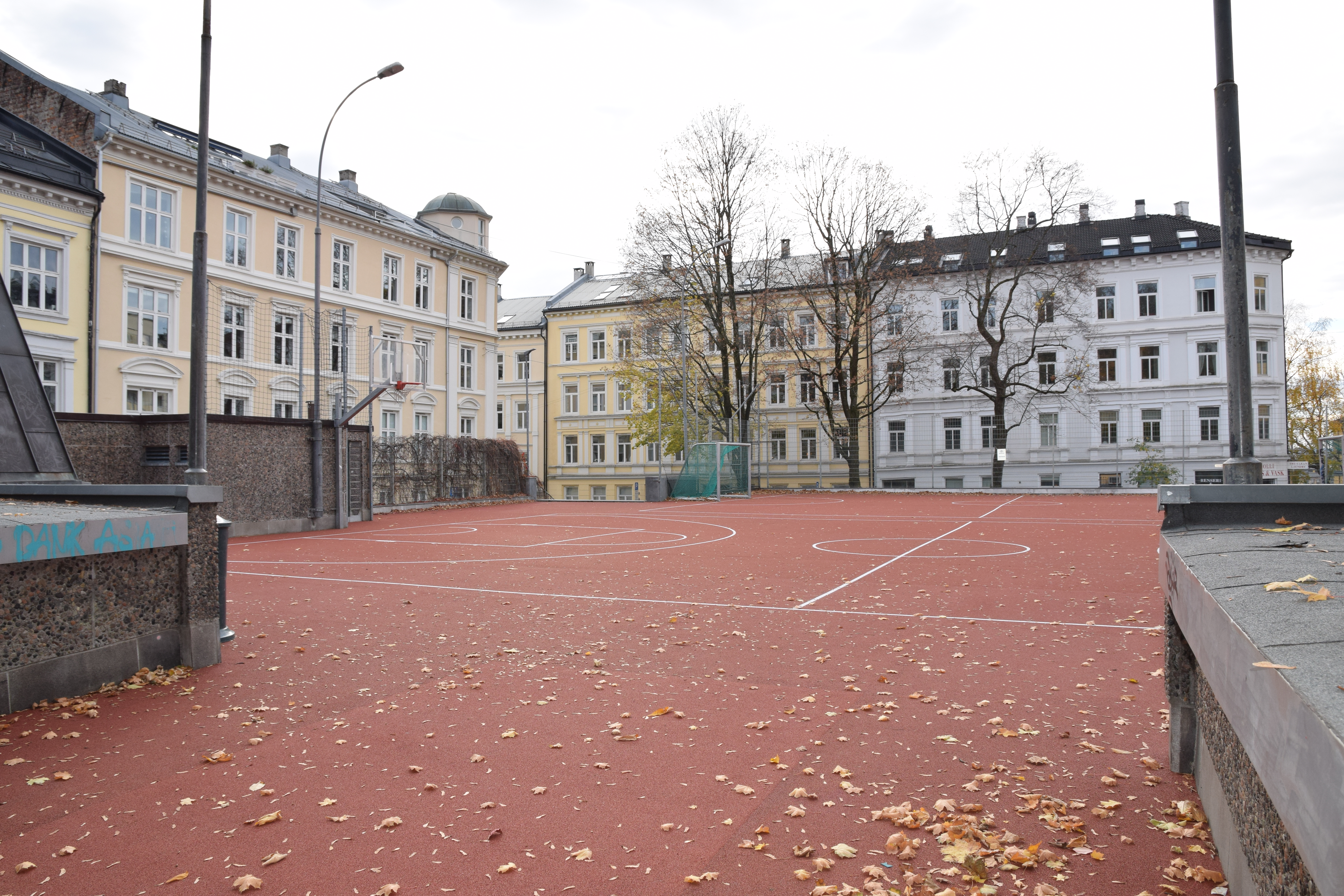 Bervens løkke sett mot Reichweins gate.